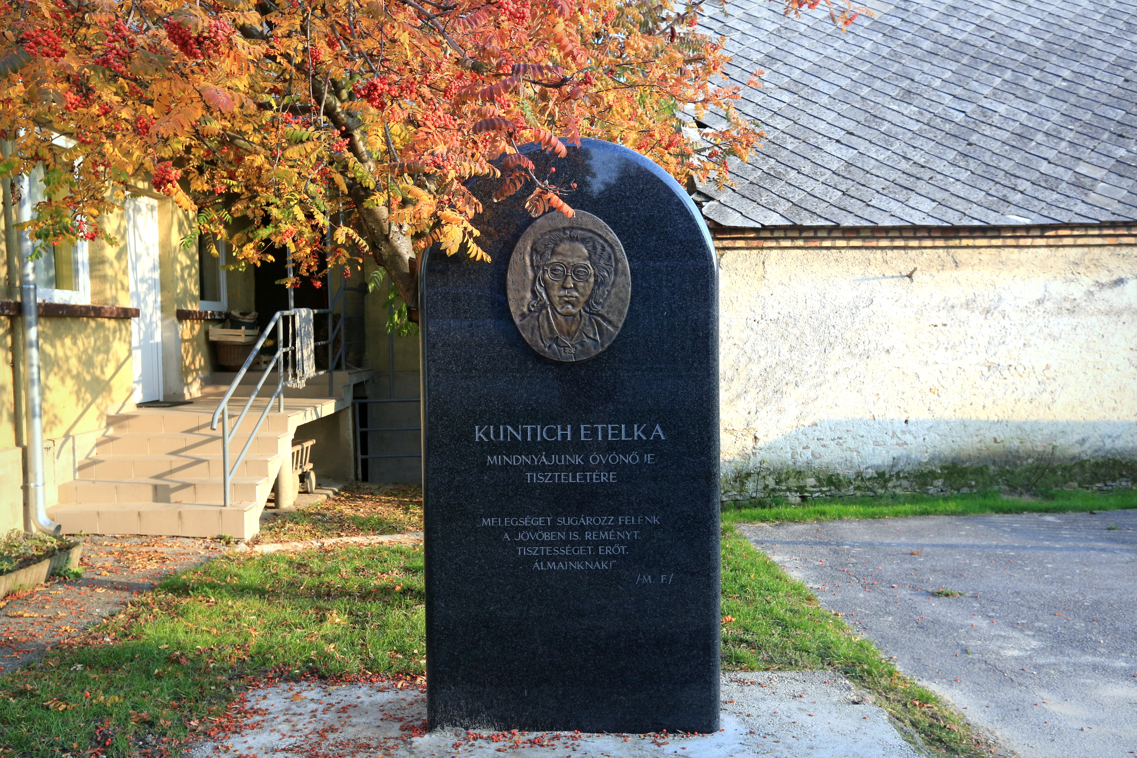 Kuntich Etelka emlék az oroszhegyi óvodaudvarán